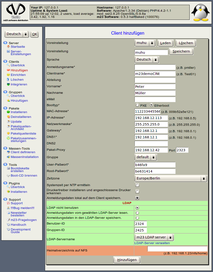 Captura de pantalla de la anadidura de un ordenador